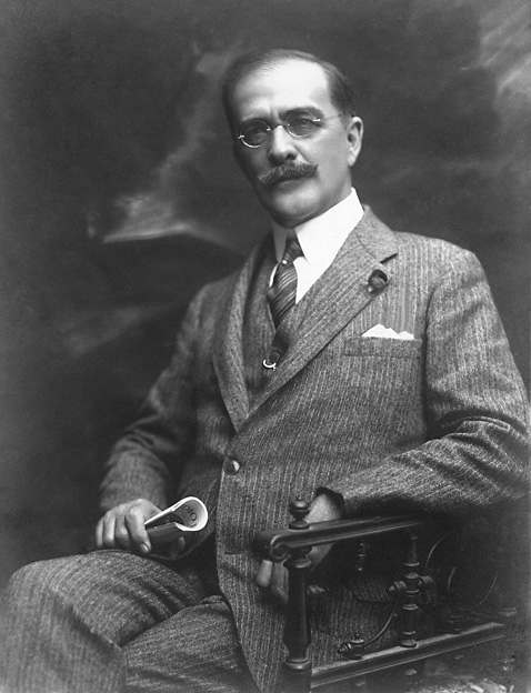 A imagem é de propriedade de Bento Pereira Bueno, neto do ilustrado